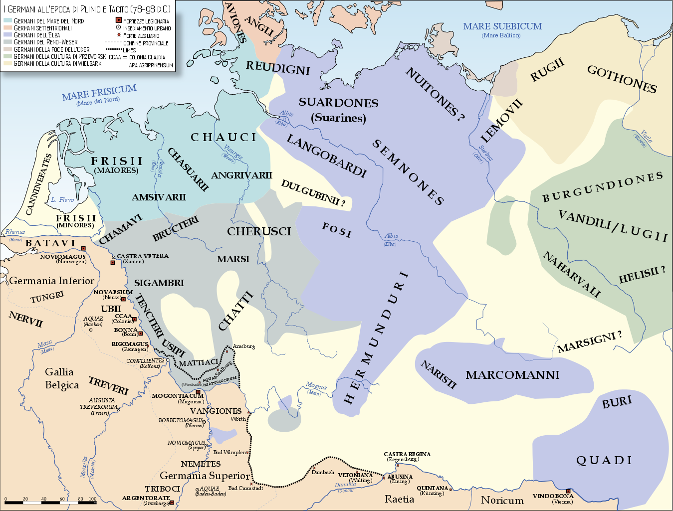 La Germania sulla base degli scritti degli storici antichi Plinio (Naturalis Historia) e Tacito (Germania), databile pertanto al 78-98 d.C. (Vespasiano-Traiano), oltre alla ricerca archeologica contemporanea. This file was derived from: GermansAD50.svg Ziegelbrenner